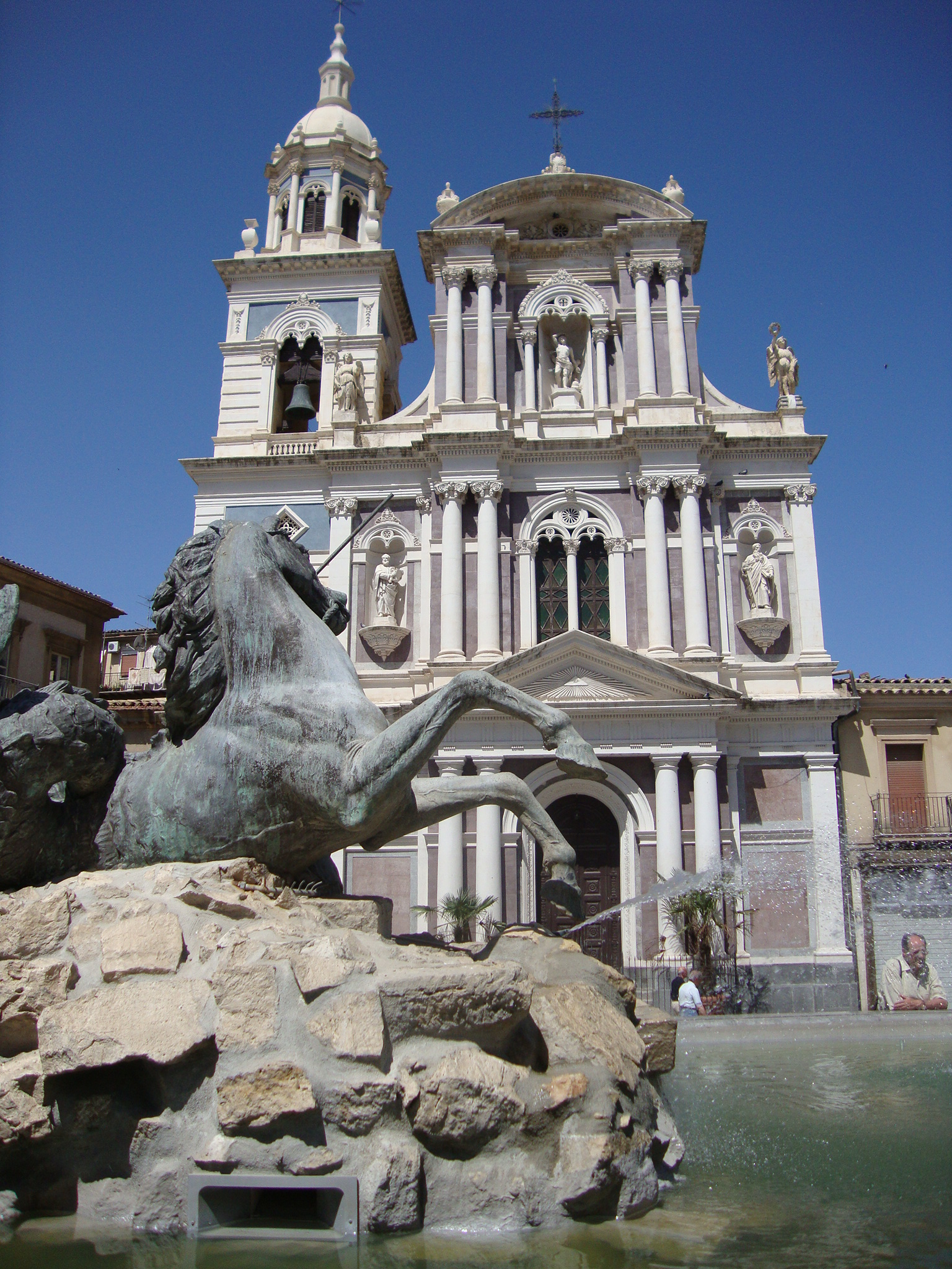 Veduta della chiesa di San Sebastiano e del gruppo scultoreo della "fontana del Tritone" di Caltanissetta dalla piazza Garibaldi.